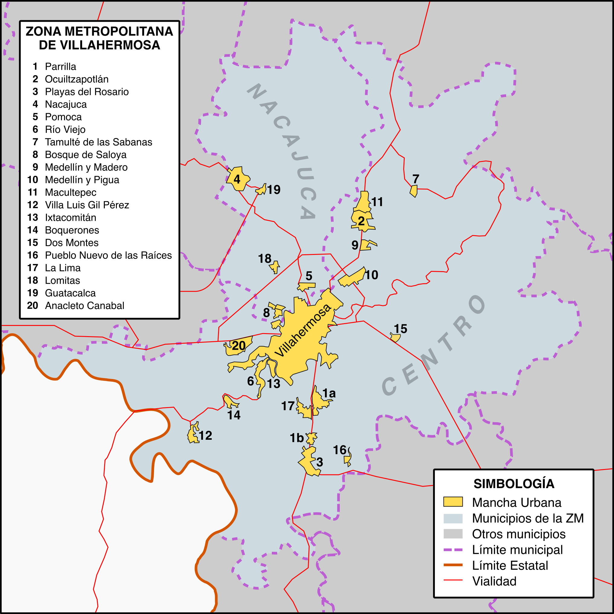 En este mapa se muestran las poblaciones que conforman la zona metropolitana de Villahermosa - Nacajuca, y las principales vialidades que las conectan.